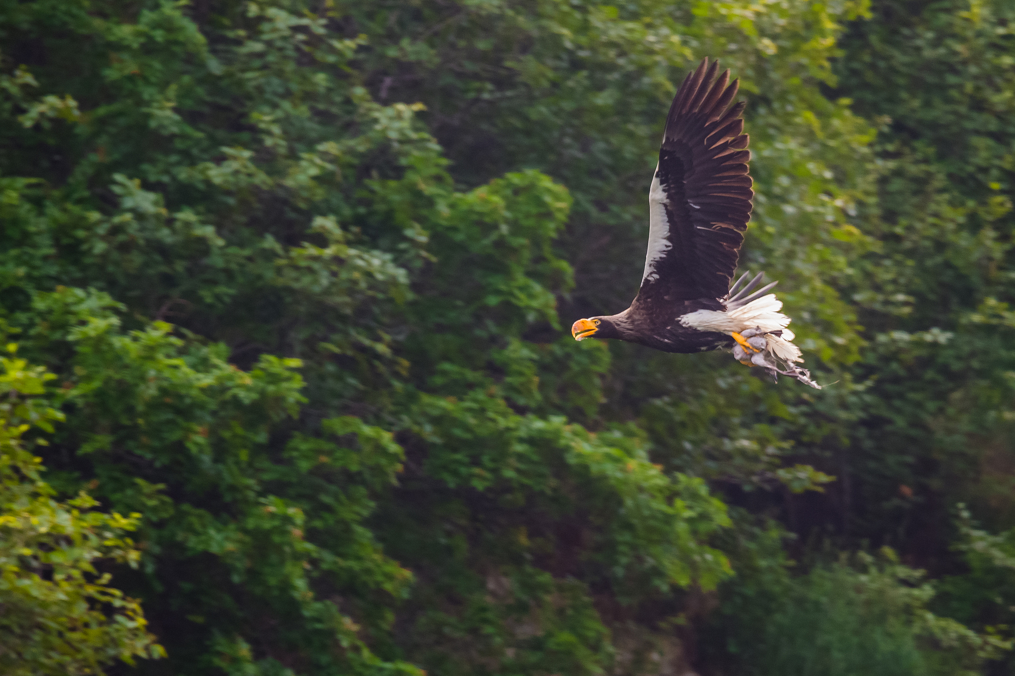 Магаданский заповедник: Ольский район, Магаданская область This image is related to the protected area of Russia number 4900024